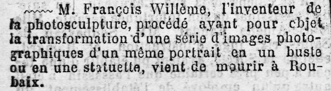 Necrologie de François Willème réduisant la photosculpture aux bustes et statuettes.